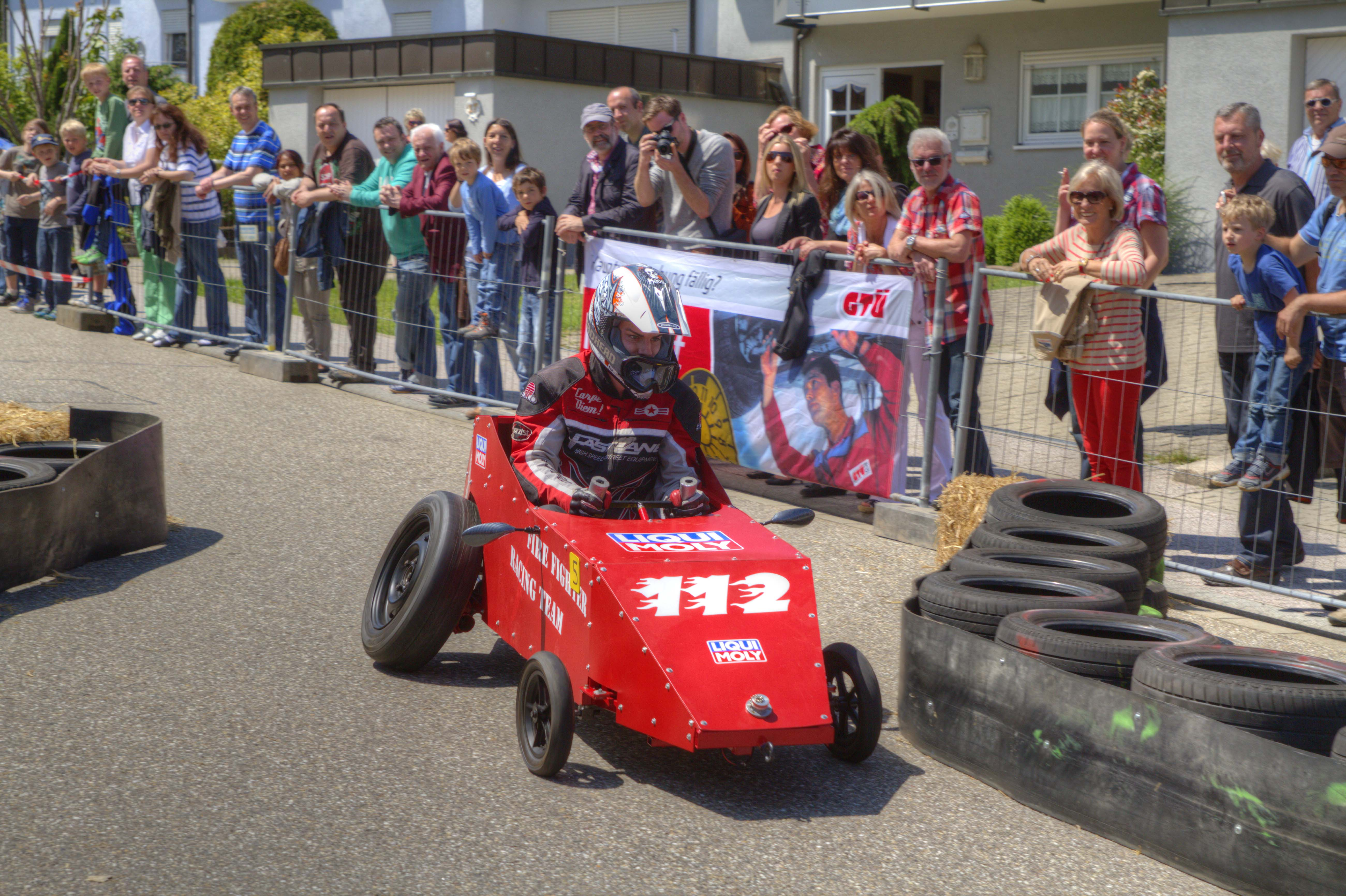 Eine Seifenkiste beim Völkersbacher Brunnenfest, einem Teilort von Malsch.